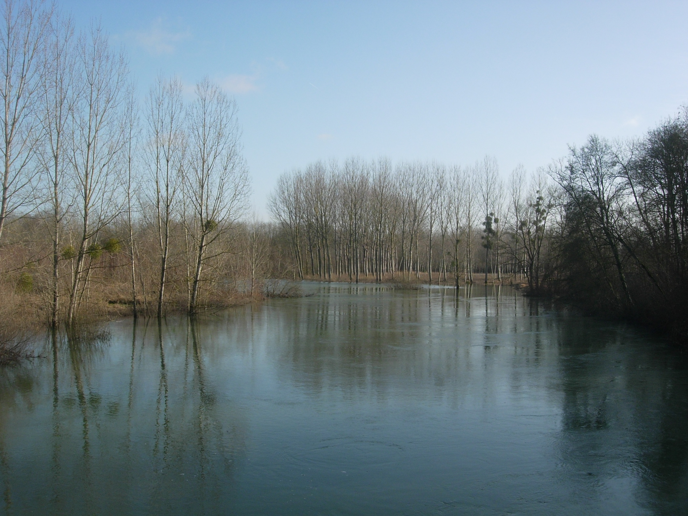 Aube (rivière) en crue - janvier 2012